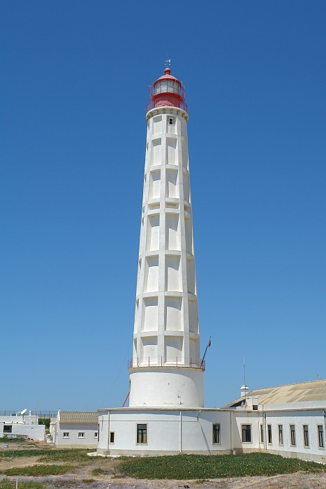 Ilha da Culatra in Ria Formosa, Portugal. Photography: Osvaldo Gago